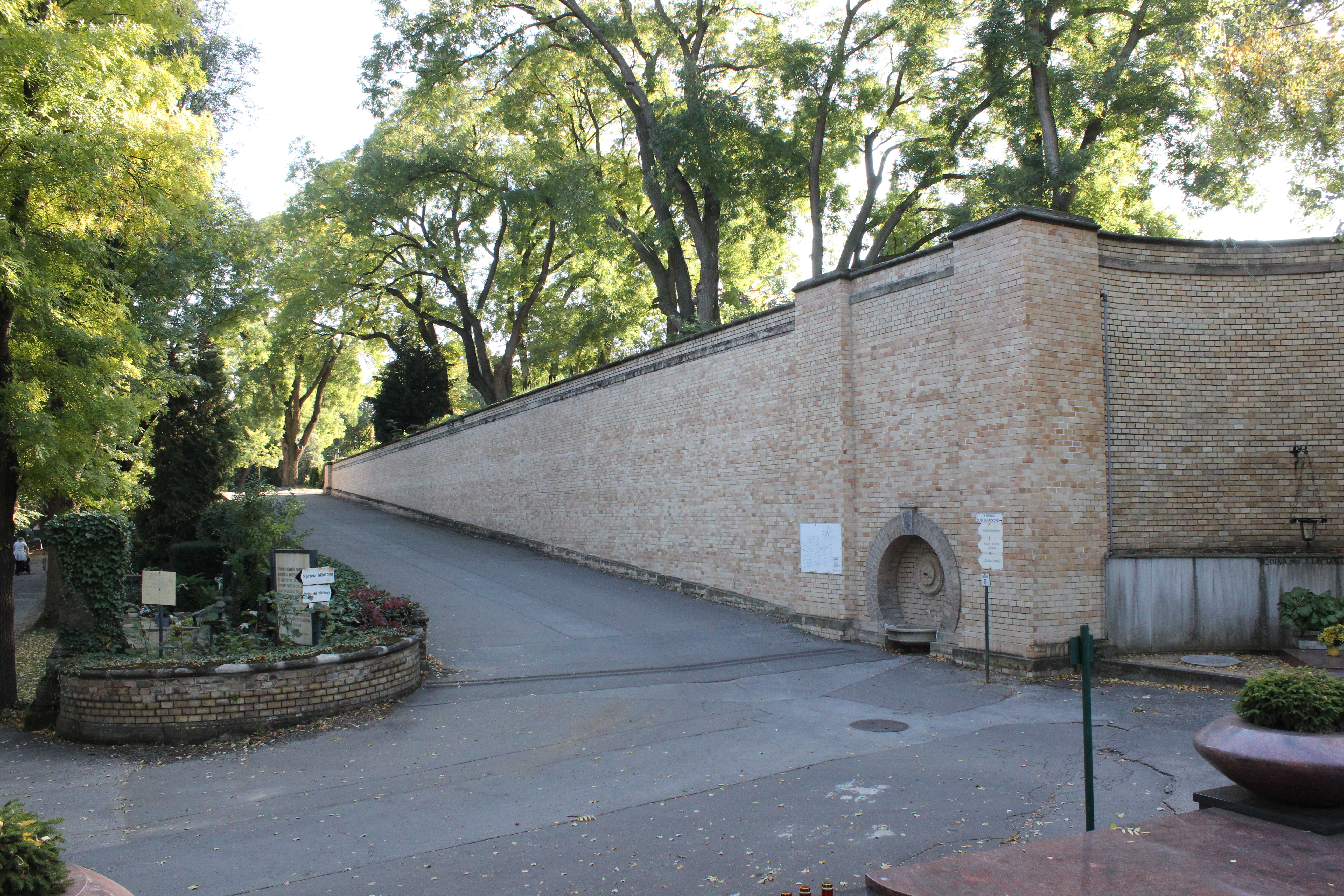 Ústřední hřbotov v Brně, střední rampa